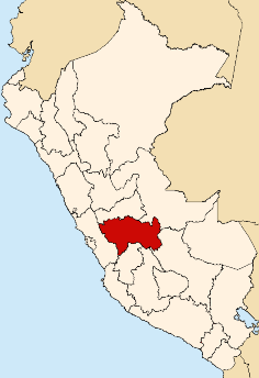 made by User:StarbucksFreak